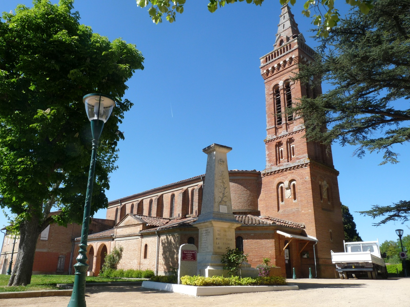 Eglise de Gauré, Haute-Garonne, France